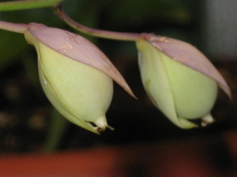 Utricularia humboldtii 's seed capsule.